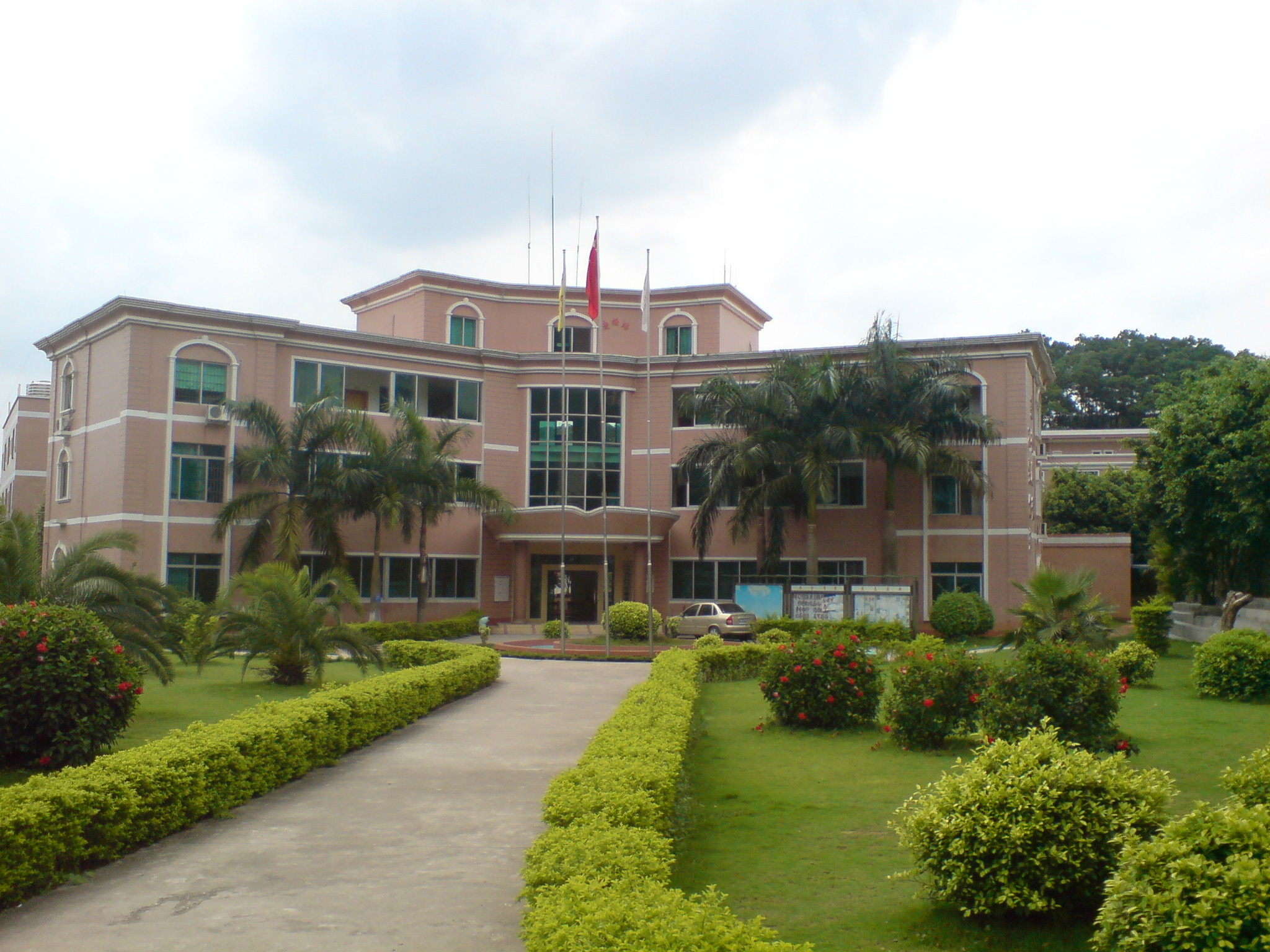 广州涉外经济职业技术学院外语学院楼